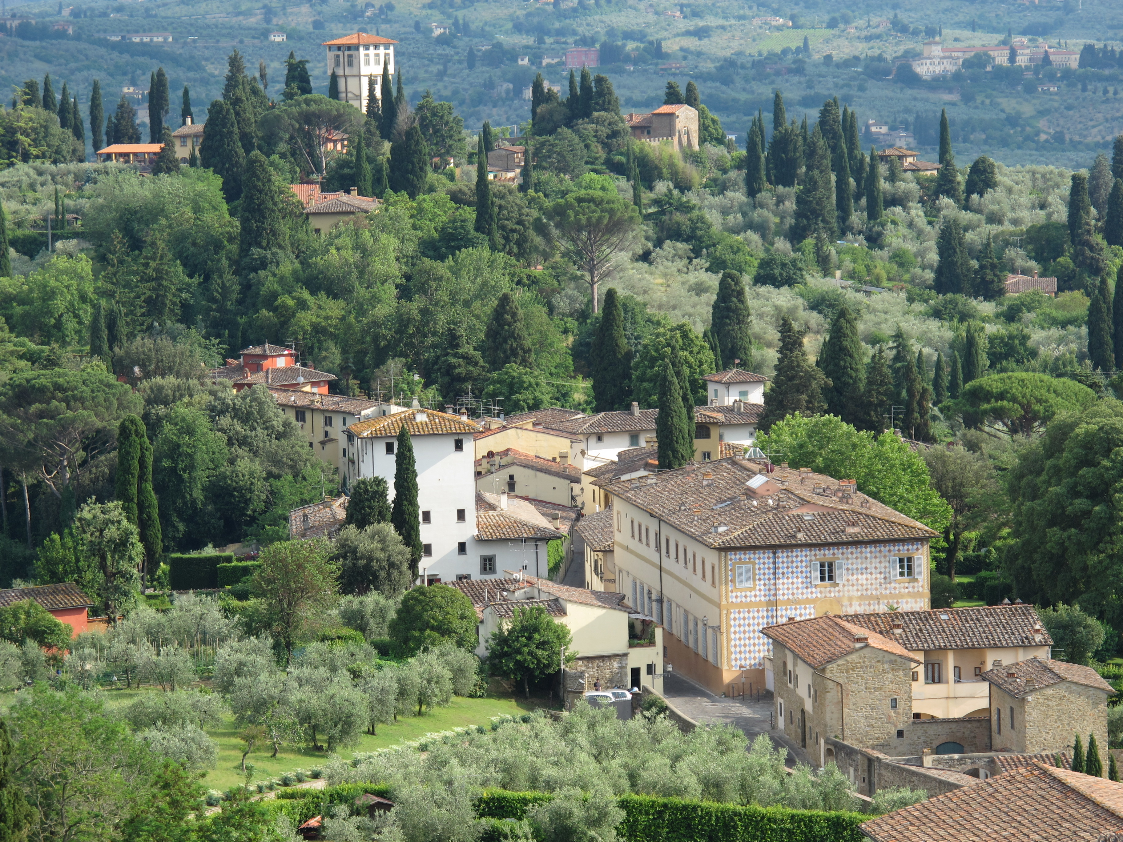 Torre del gallo, veduta, pian dei giullari